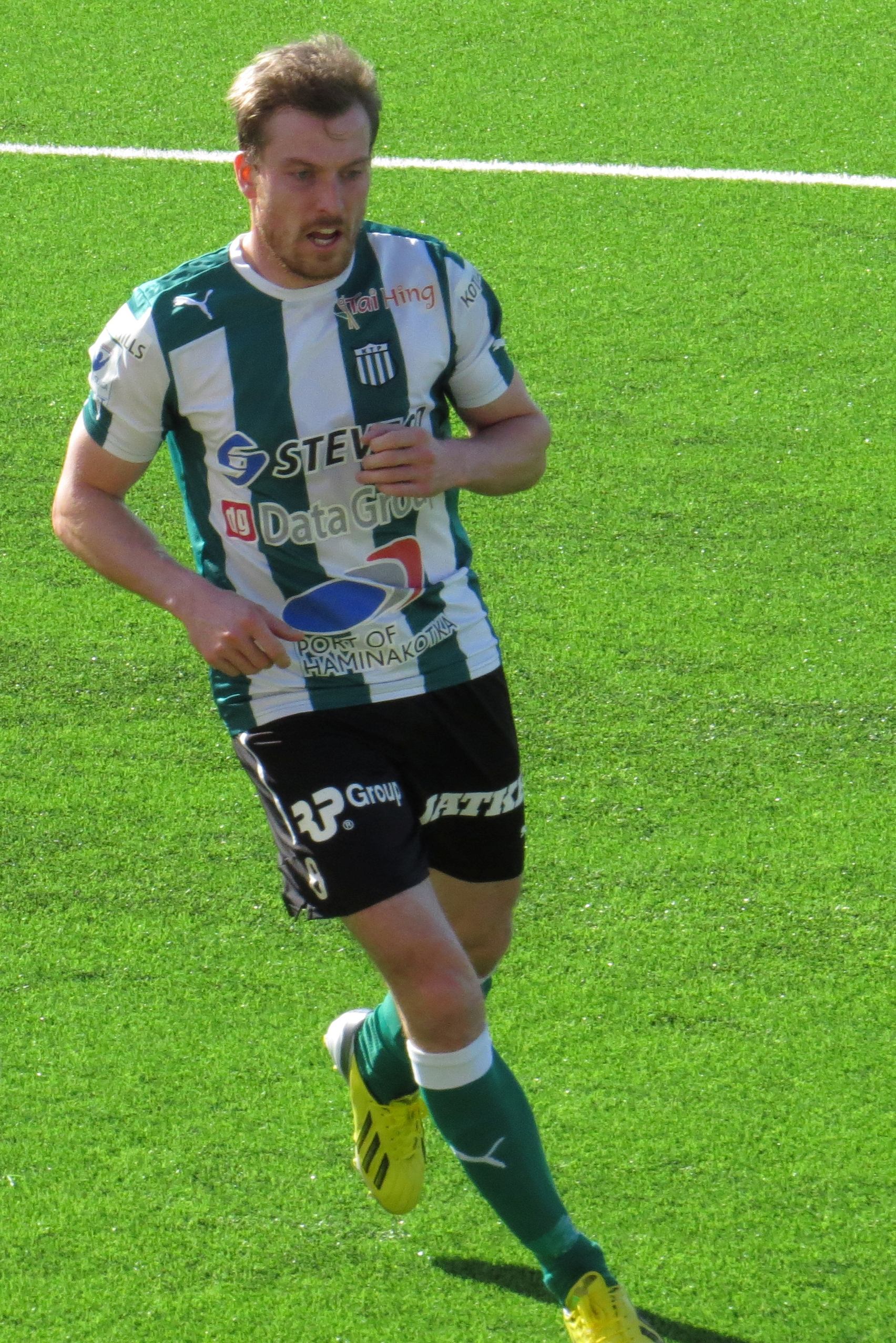 Ville Oksanen, suomalainen jalkapalloilija FC KTP:n paidassa kaudella 2015.